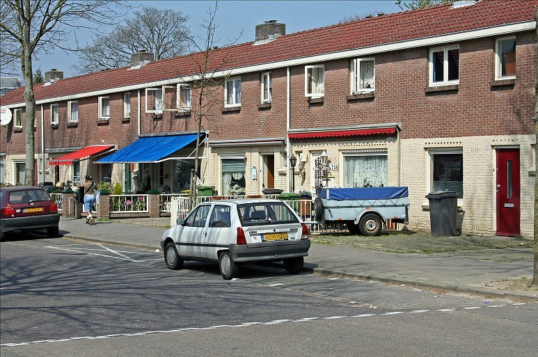 in de wijk Woensel-West (Groenewoud) in Eindhoven (Woensel, Erp)